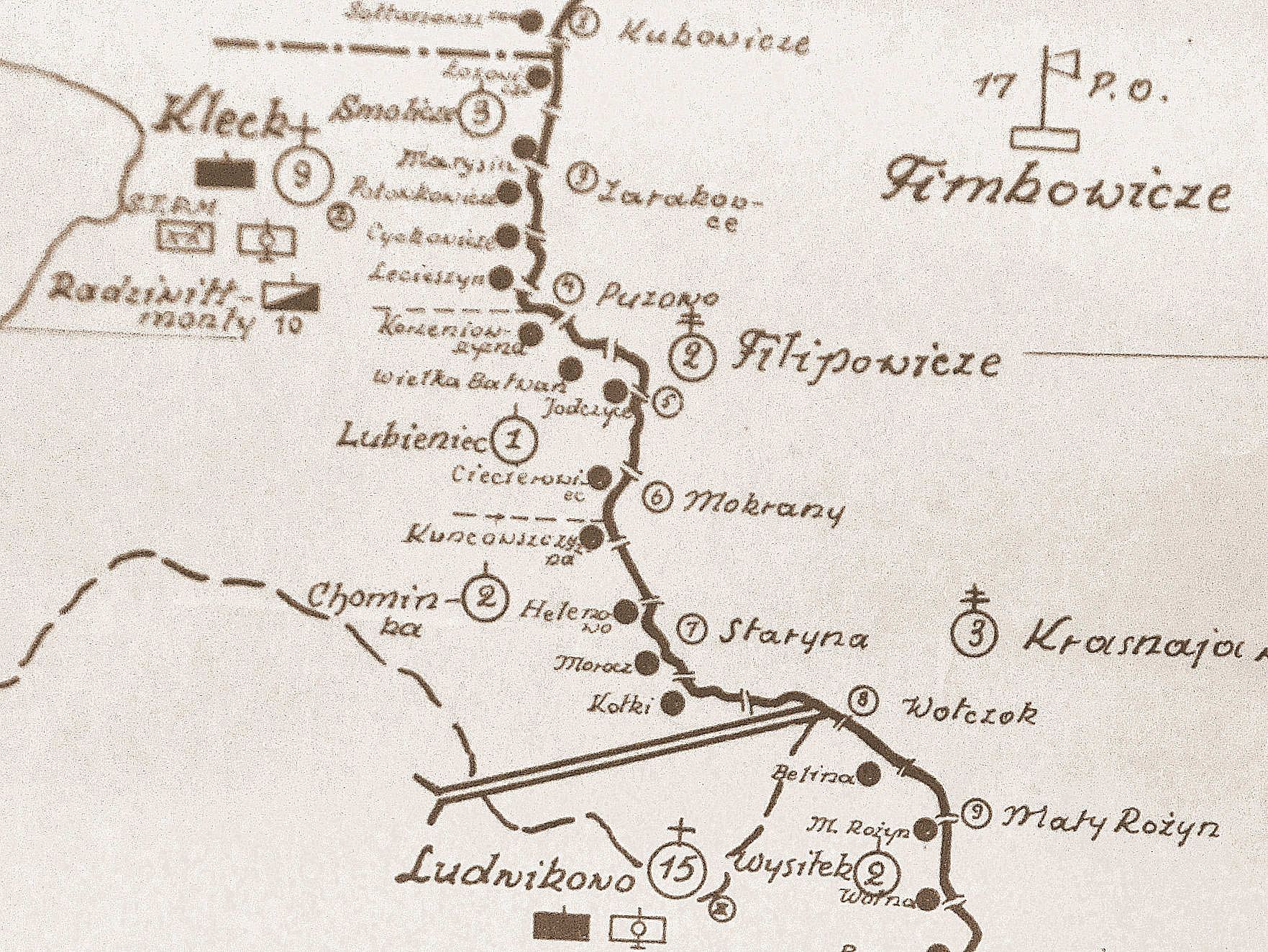 Szkic rozmieszczenia batalionu KOP Kleck w 1931